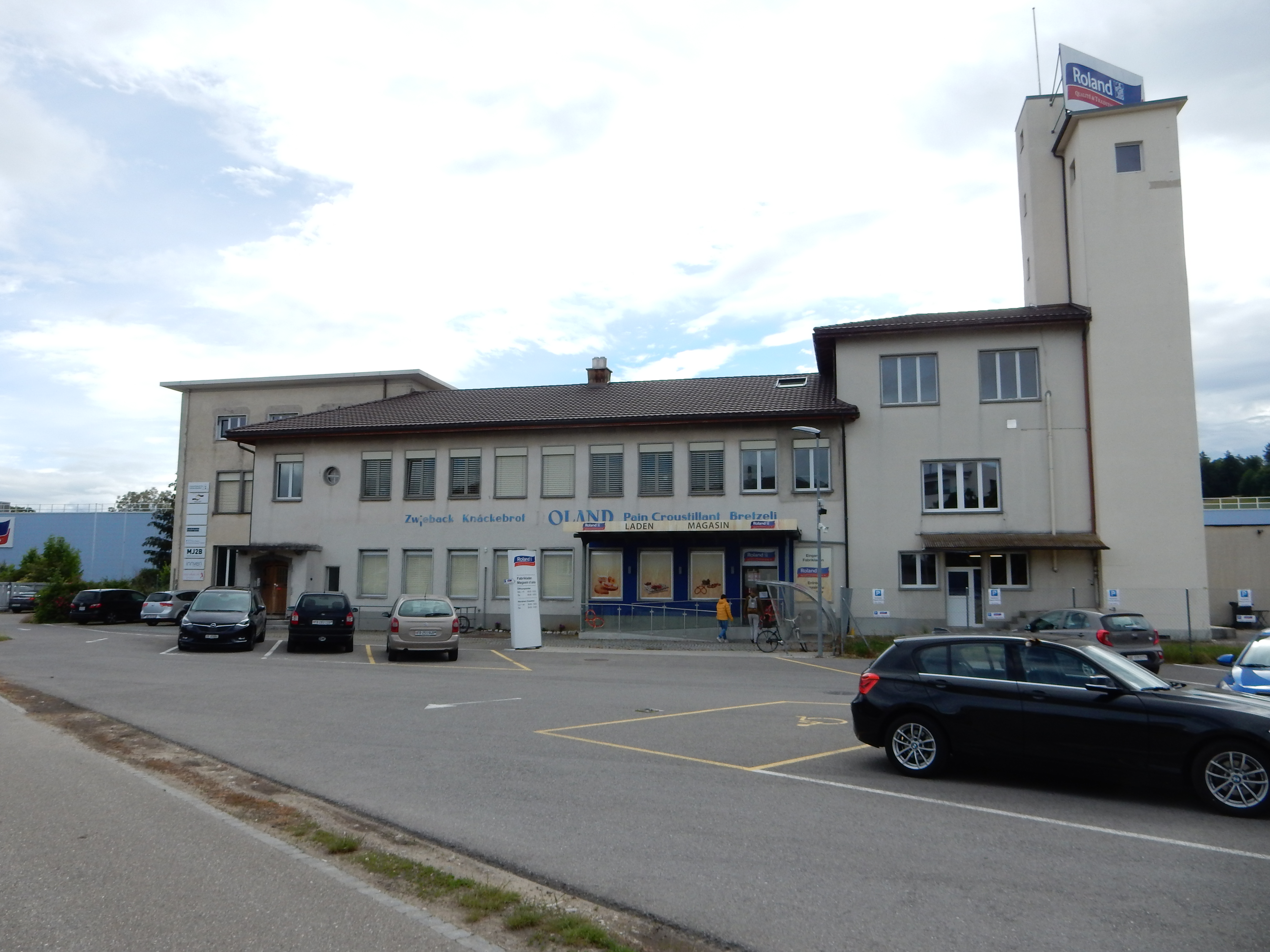 Roland Murten AG in Murten (Schweiz)